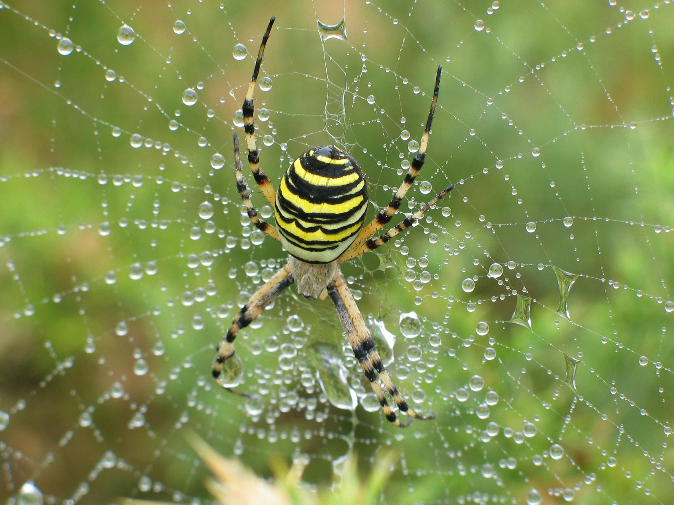 Araña Tigre en las Islas Cíes This is a photography of a Special Area of Conservation in Spain with the ID: ES0000001. Natura2000 entry, EEA entry